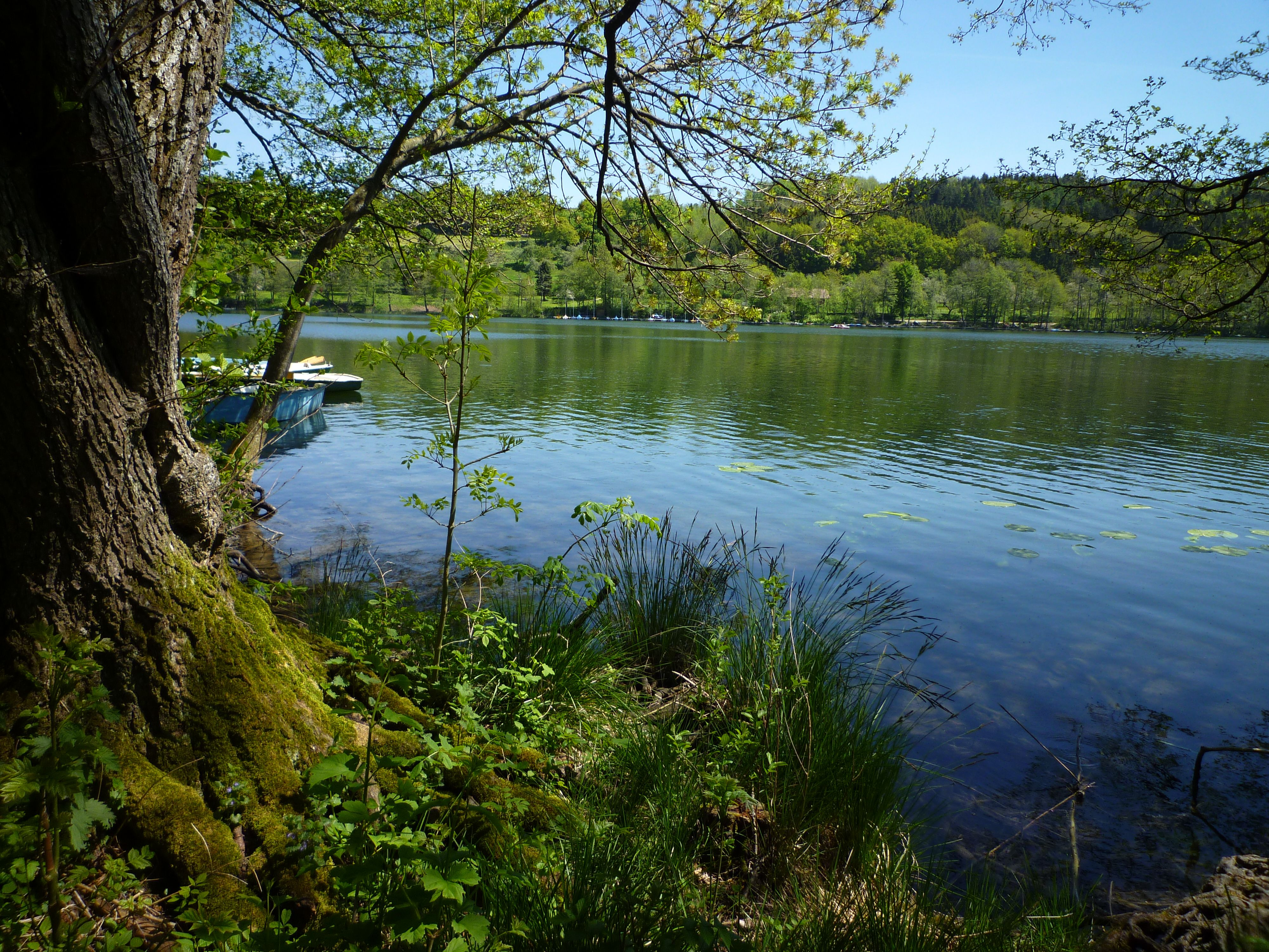 Sicht auf Westufer des Illmensees